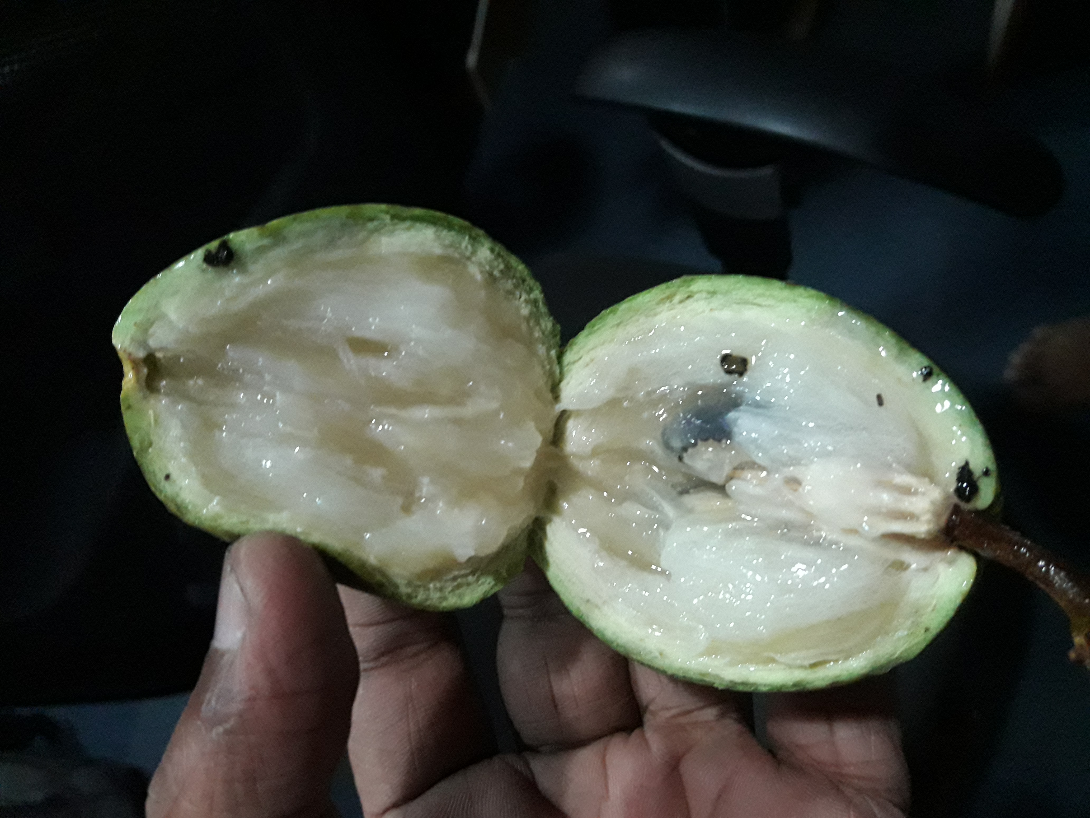 fruit